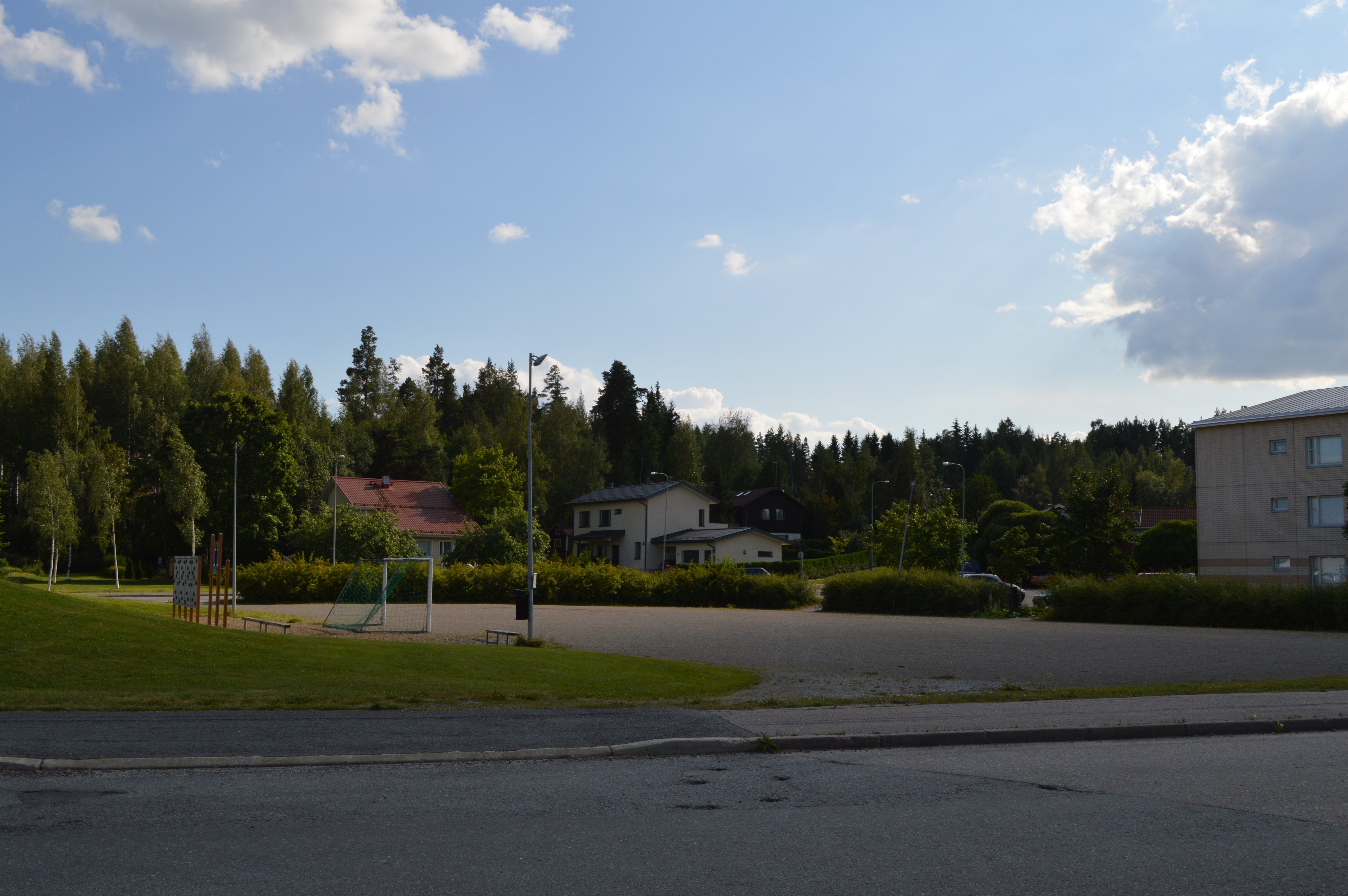 Pirkkalan Pakkalankulmaa